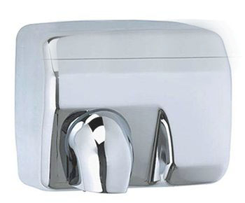 secador de manos calsico